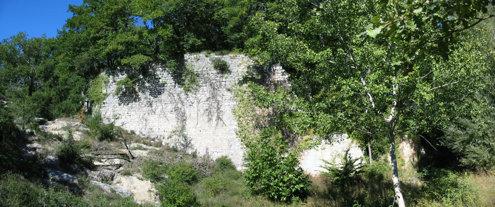 Le barrage des Etangs à Murs